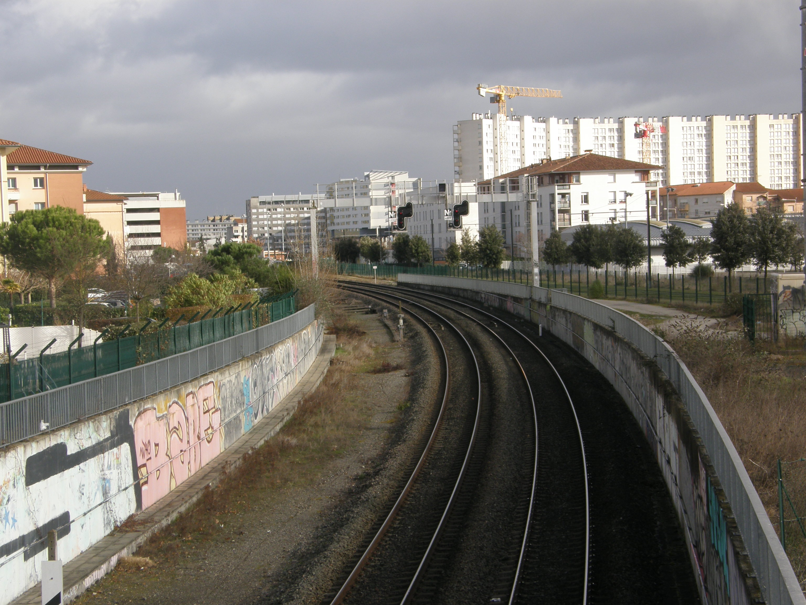 La ligne C vers les Arènes au niveau de l'hippodrome de la Cépière